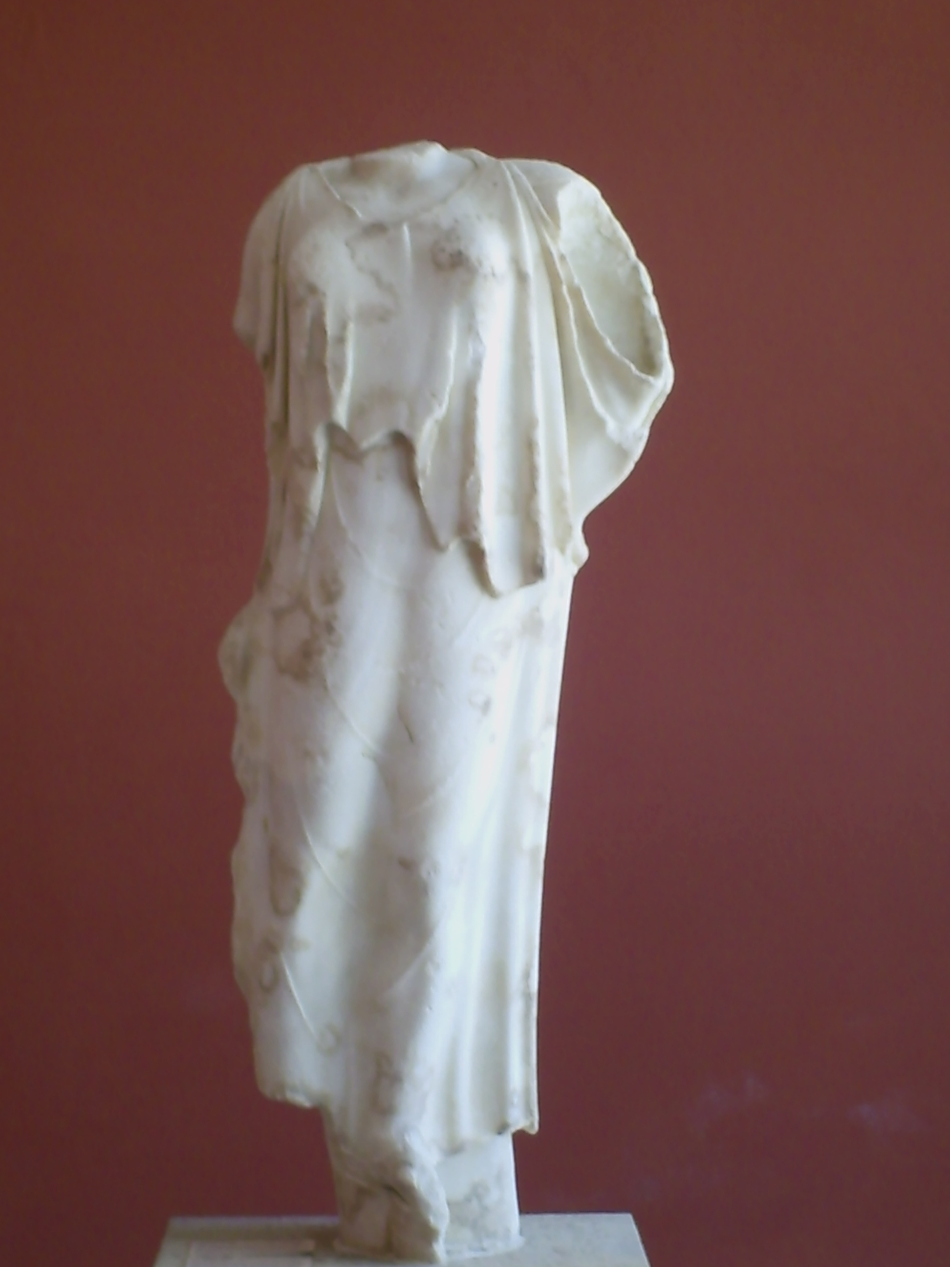 Statue de Niké (marbre de Paros). 480-470 avant J. C.